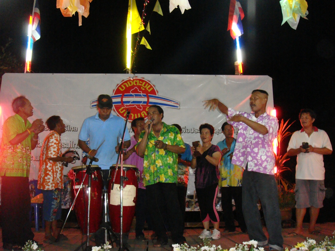 การละเล่นพื้นบ้าน